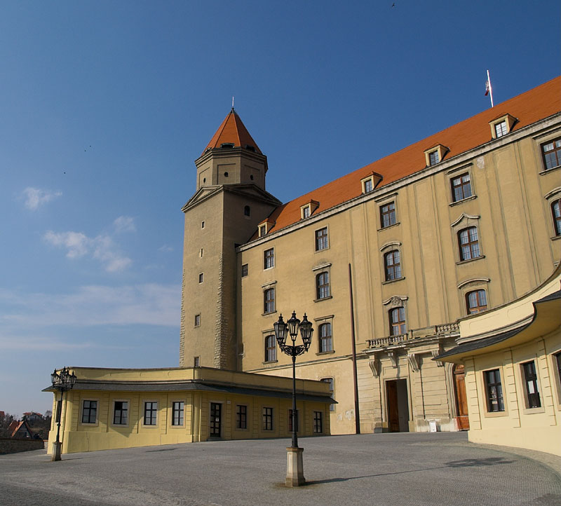 Bratislava CastleBratislava Castle